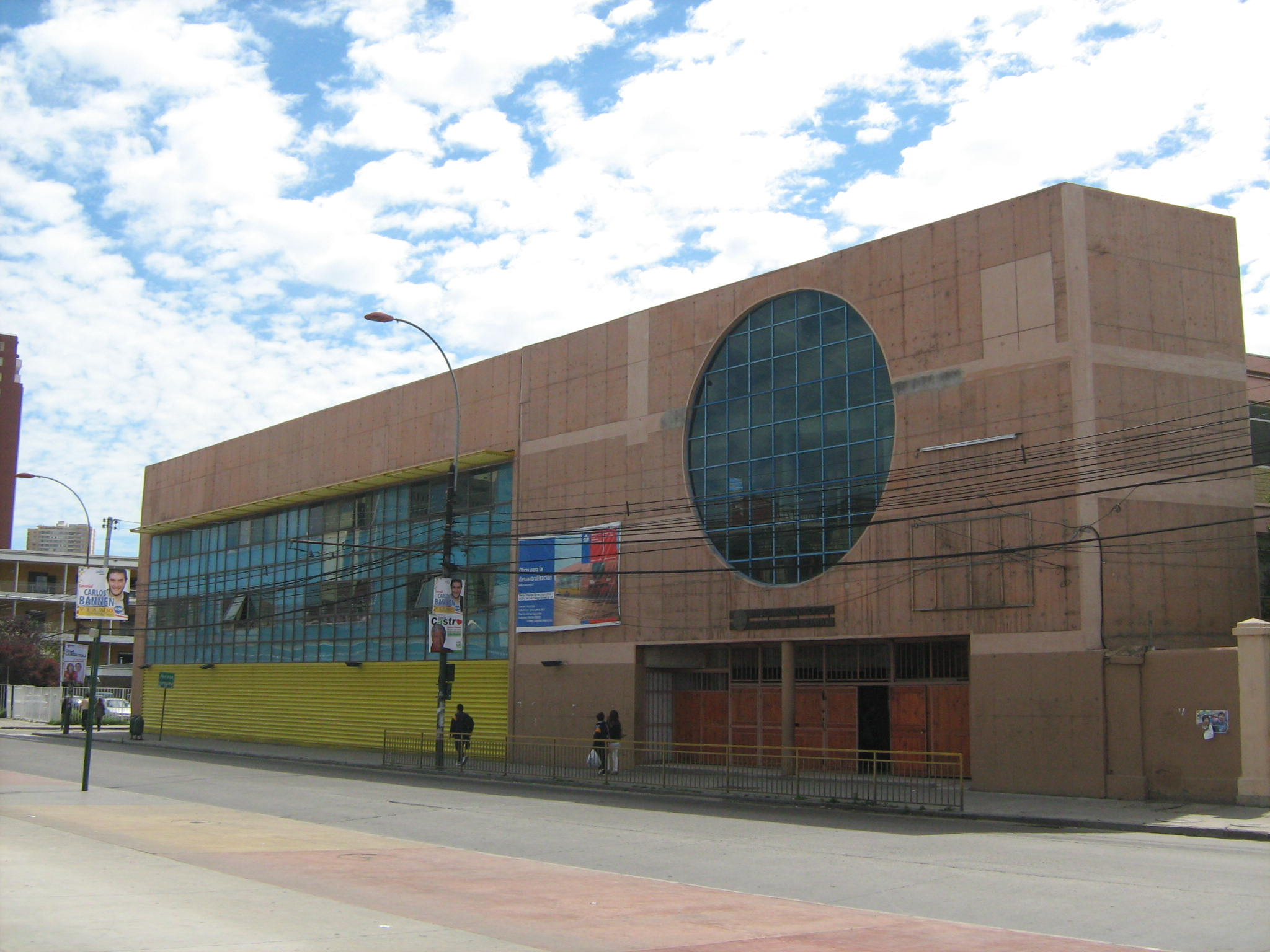 Frontis Instituto Superior de Comercio de Valparaíso Francisco Araya Bennett